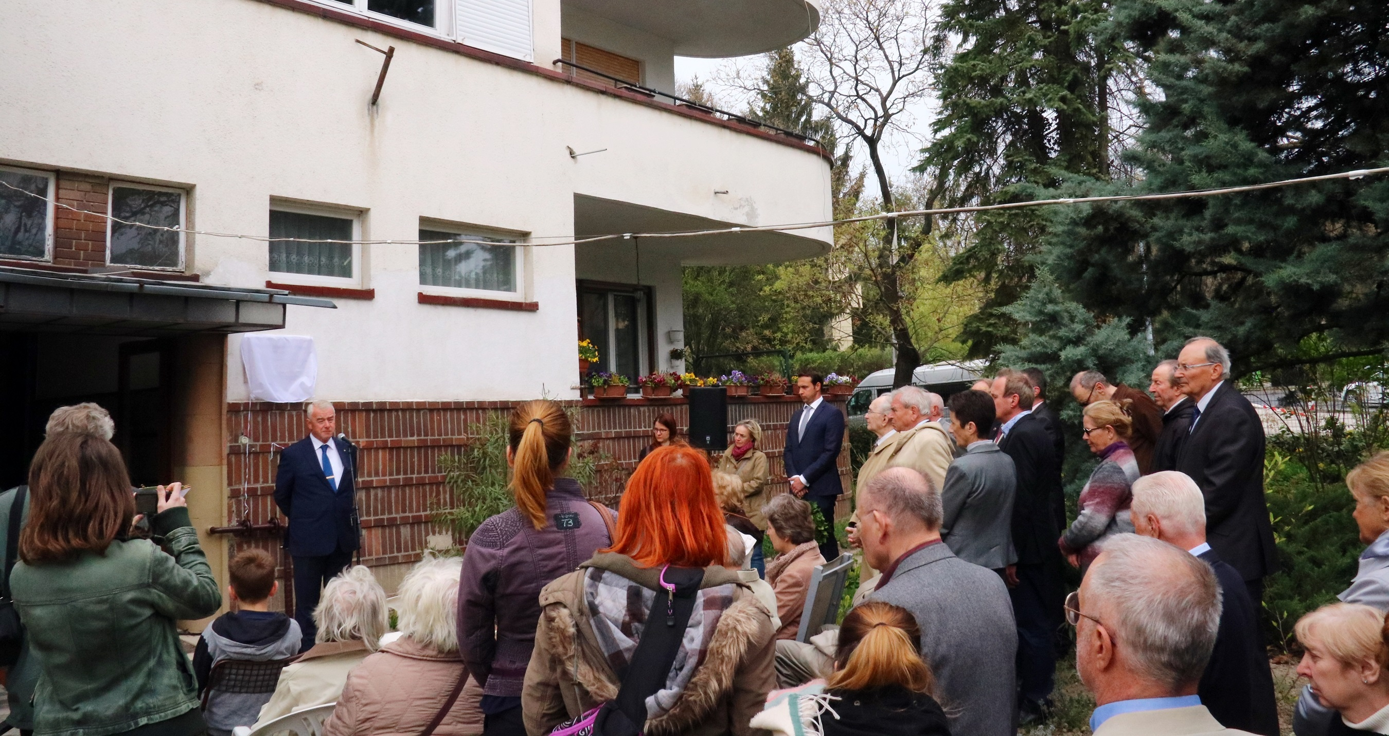 005_Emléktábla avatás_Haraszti